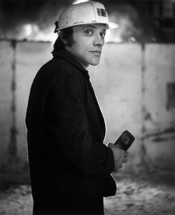 Metalurg, 1968